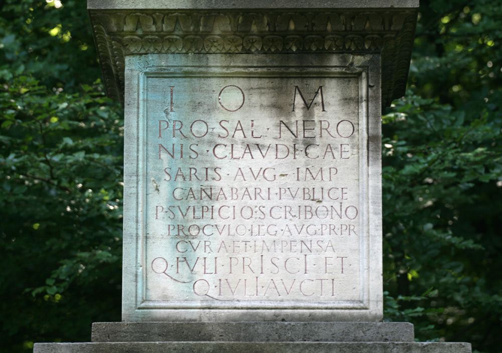 Reproduktion der Jupitersäule Mainz mit Inschrift (Rekonstruktion Saalburg)